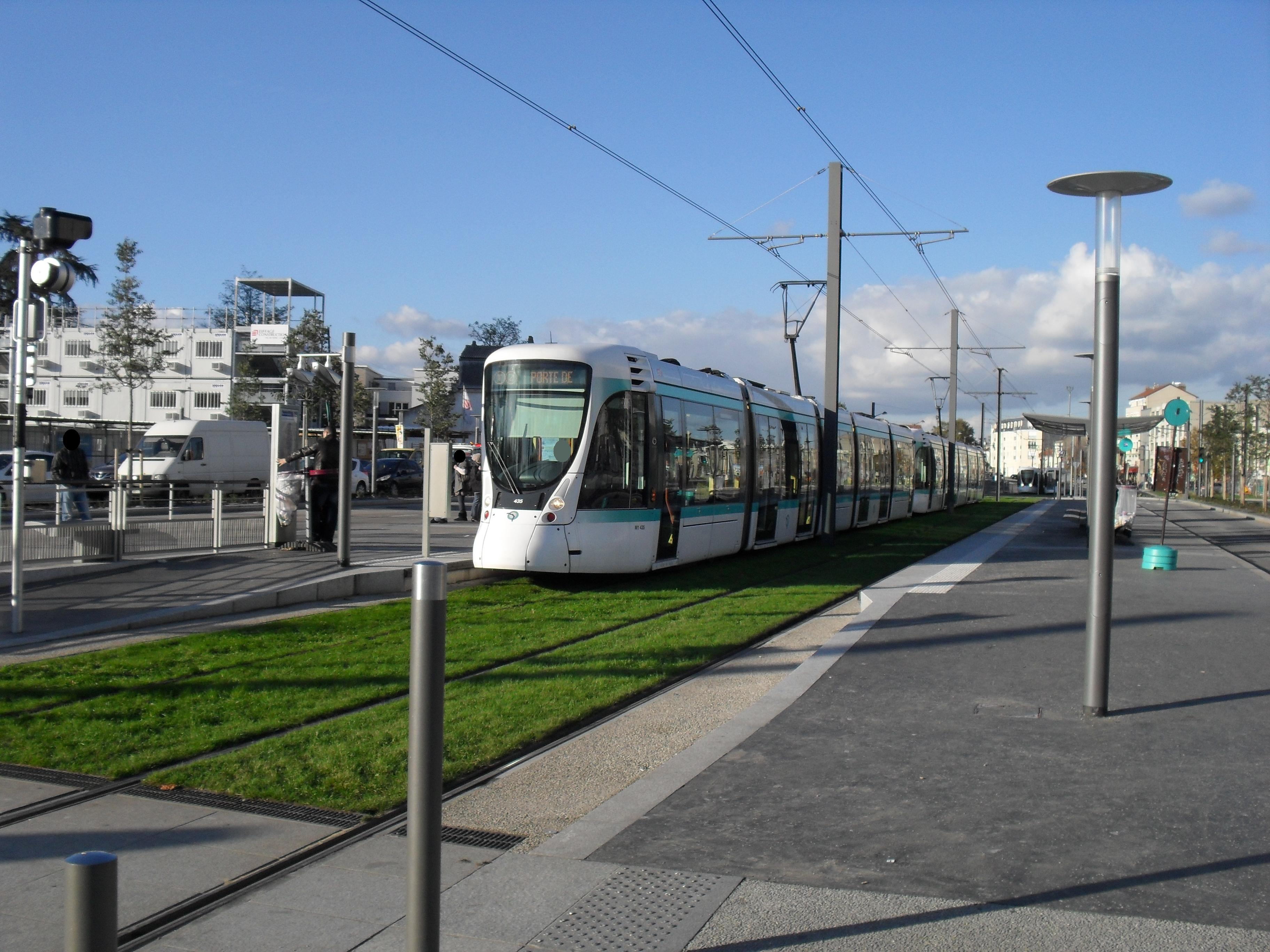 Paris Tramway ligne 2